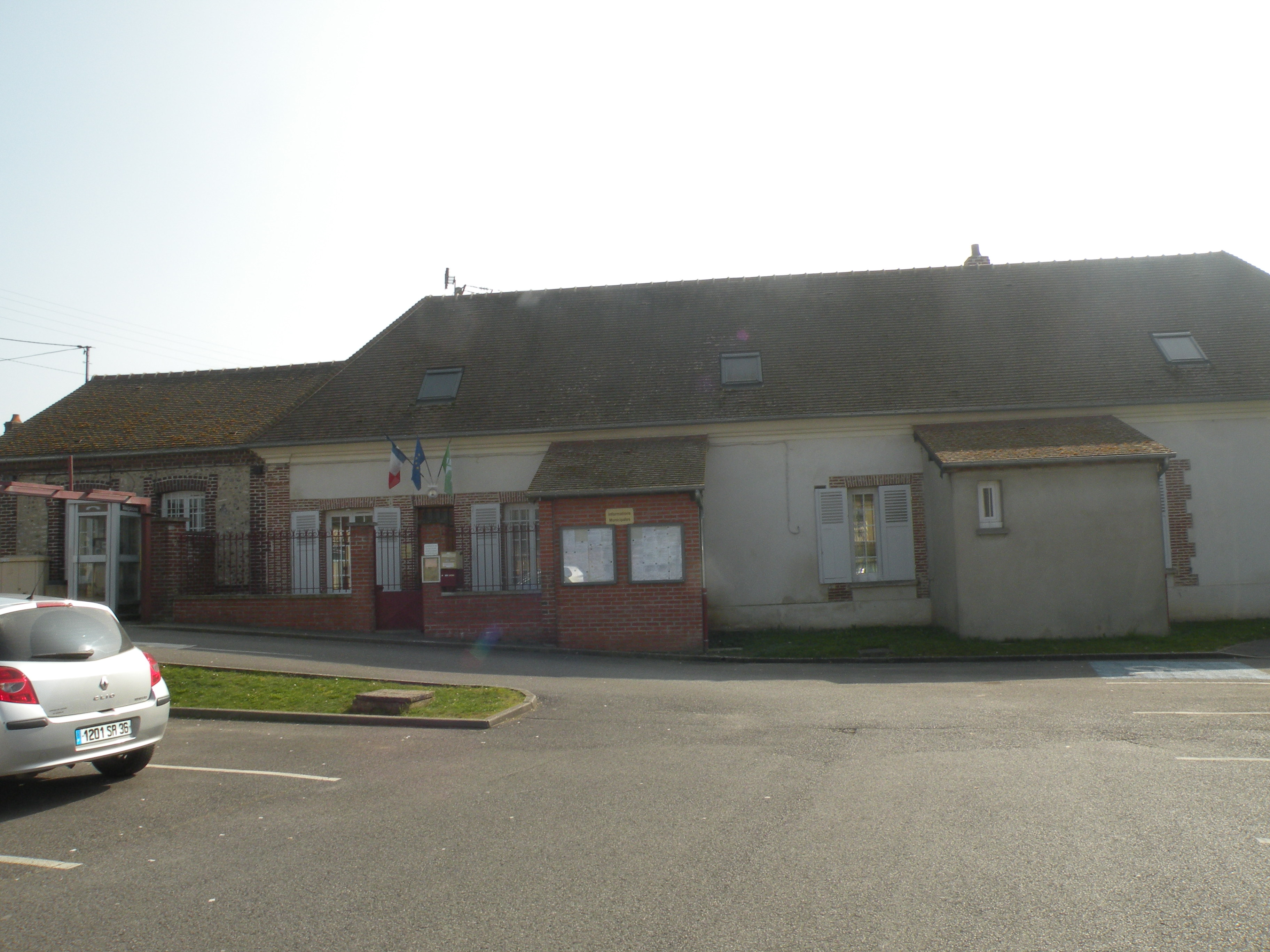 Éragny-sur-Epte